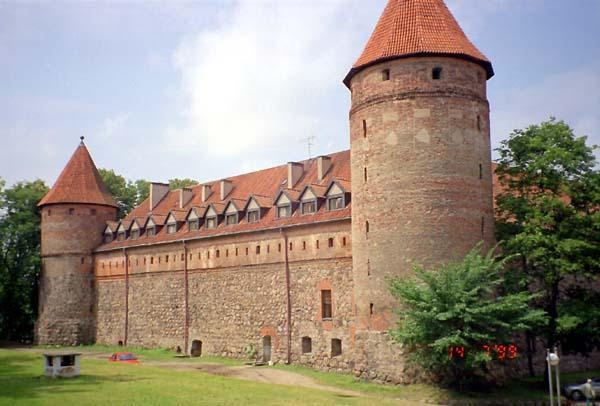 Zámek Bytów, Polsko